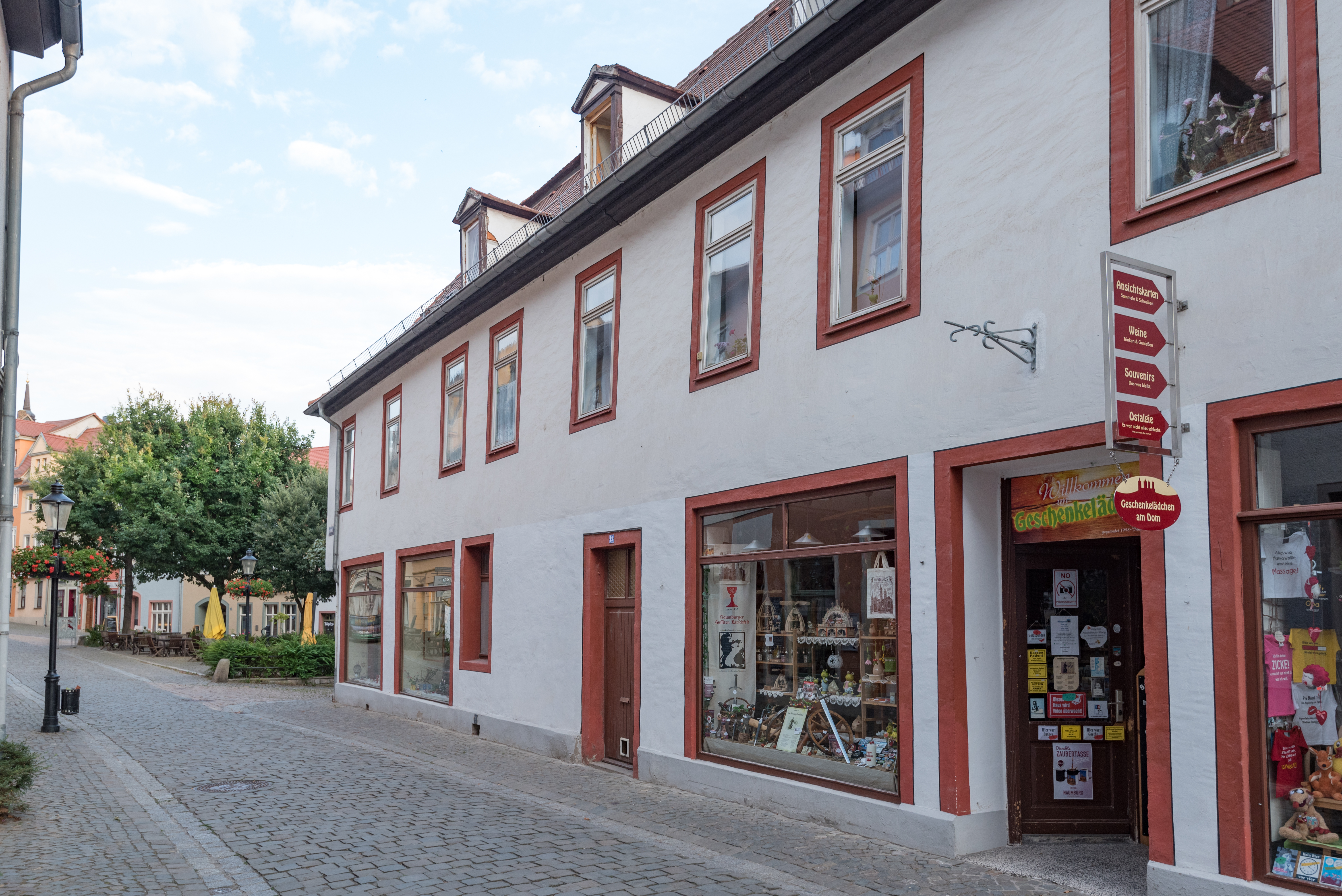 Naumburg (Saale), Steinweg 19